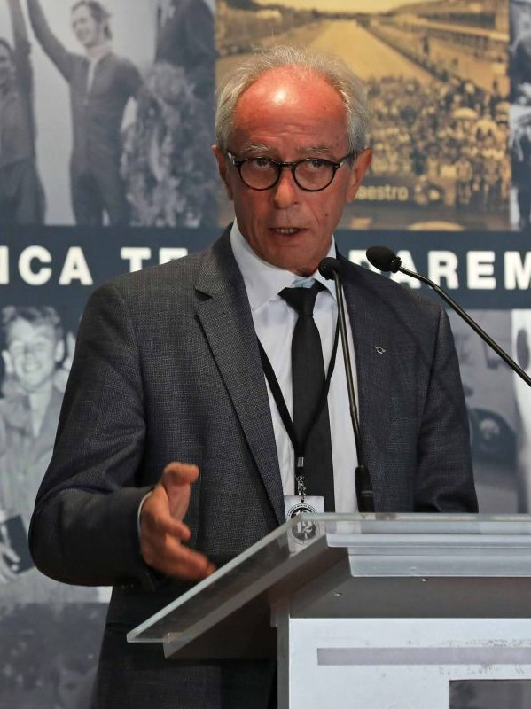 Instituciones y personalidades se han sumado esta mañana a familiares y amigos para rendir un sentido homenaje a Ángel Nieto, campeón mundial de motociclismo e hijo adoptivo de Madrid en un acto organizado por su familia con la colaboración del Ayuntamiento de Madrid y el Consejo Superior Deportes. Desde el Pabellón de los Jardines de Cecilio Rodríguez, del Parque de El Retiro, la alcaldesa de Madrid, Manuela Carmena ha destacado la personalidad “excepcional” del campeón “12+1”, “su pasión y su bondad”. La ciudad de Madrid, “donde pasó su infancia y se fraguó su pasión, necesita muchas personas como él y no le olvidará nunca”, manifestó la alcaldesa, en unas palabras que también repasaron otros aspectos de “quien fue capaz de poner a España en un lugar impensable del motociclismo internacional”.